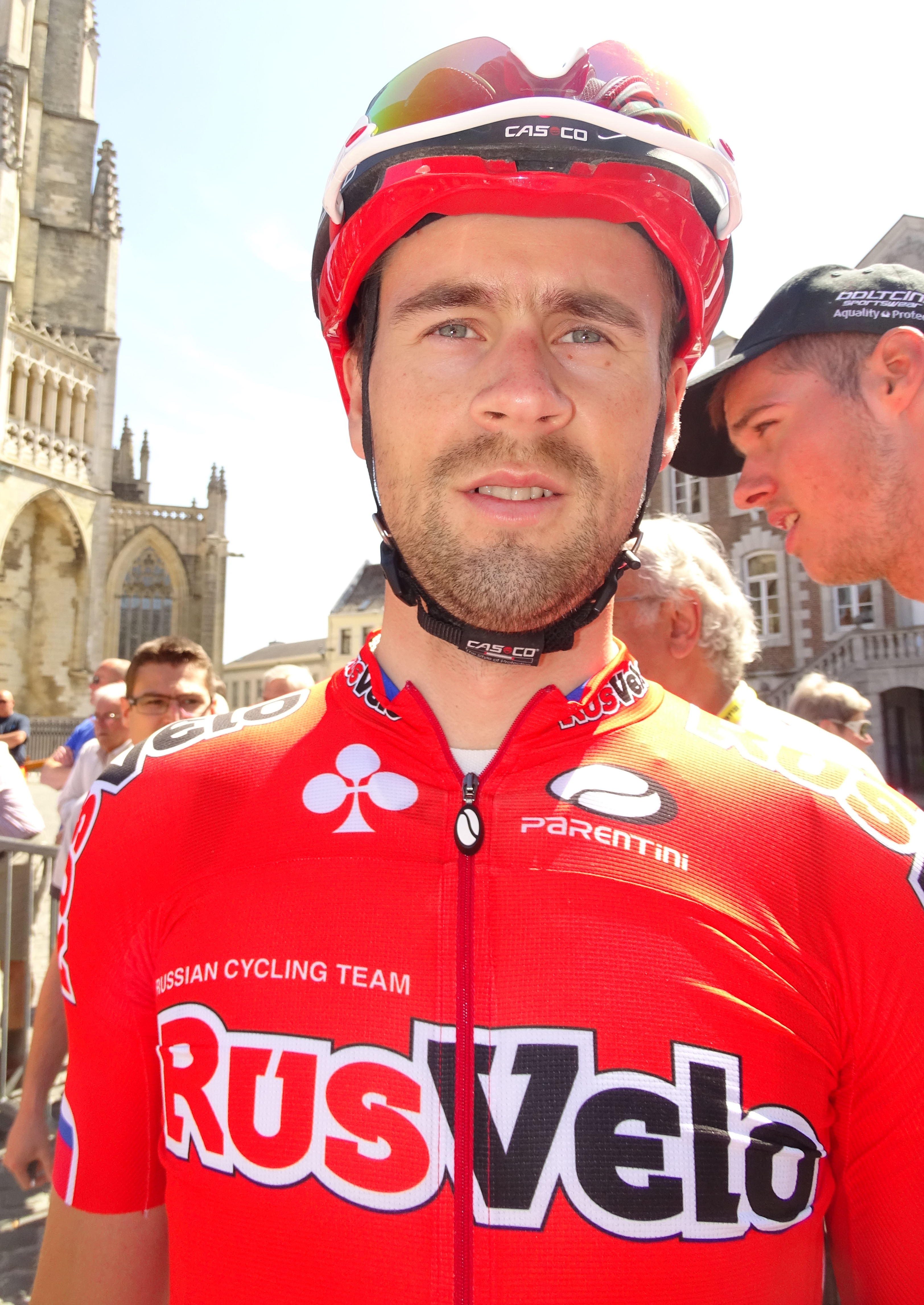 Reportage réalisé le dimanche 14 juin à l'occasion du départ et de l'arrivée du Tour du Limbourg 2015 à Tongres, Belgique.